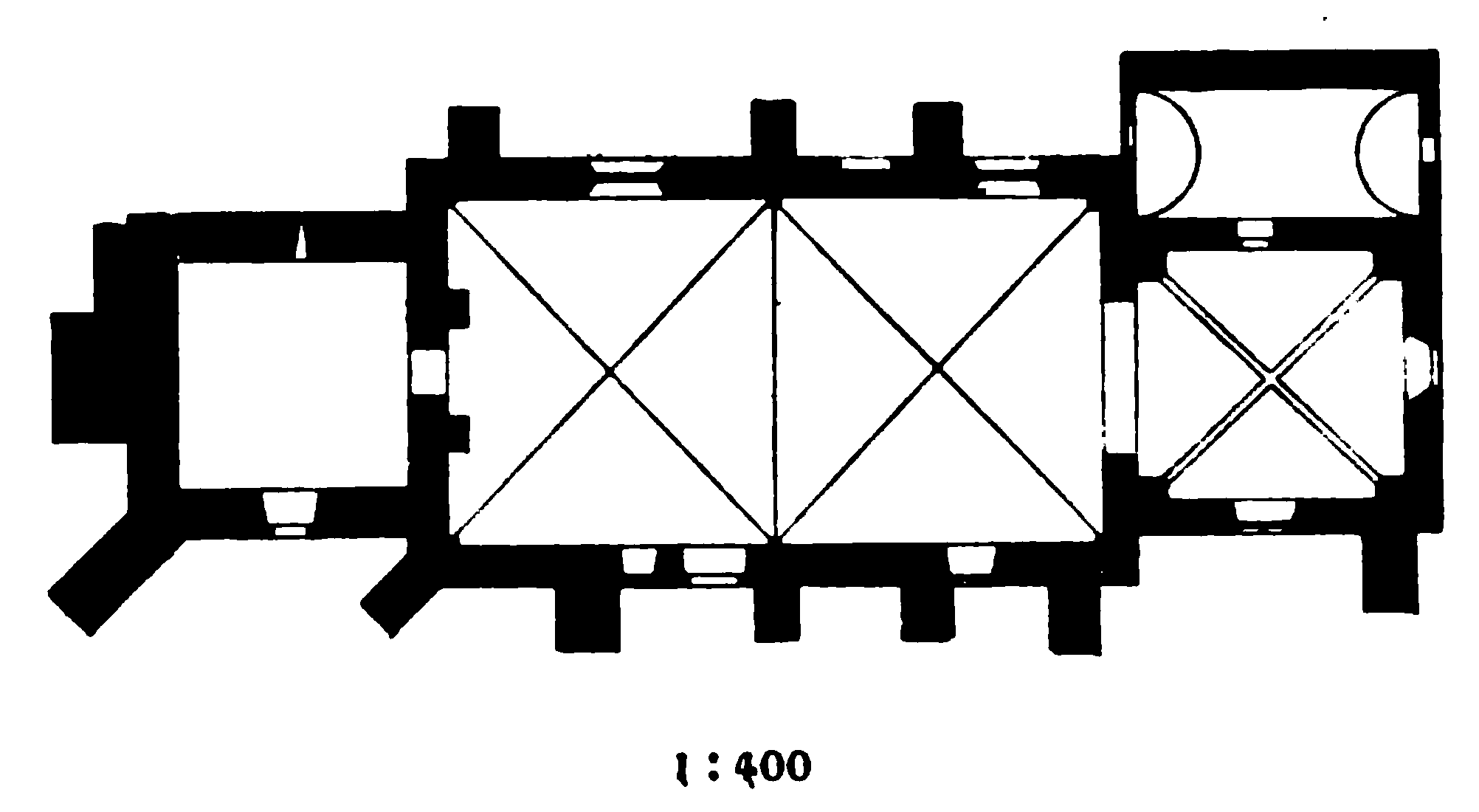 Grundriss der Ev. Kirche in Heimsen, Stadt Petershagen